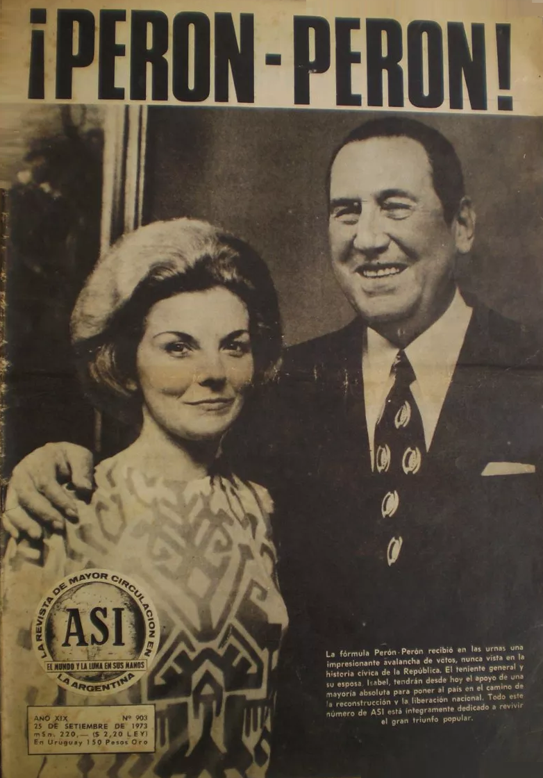 Anuncio de victoria de la fórmula Perón - Perón por parte de la Revista Peronismo, 24 de septiembre de 1973.